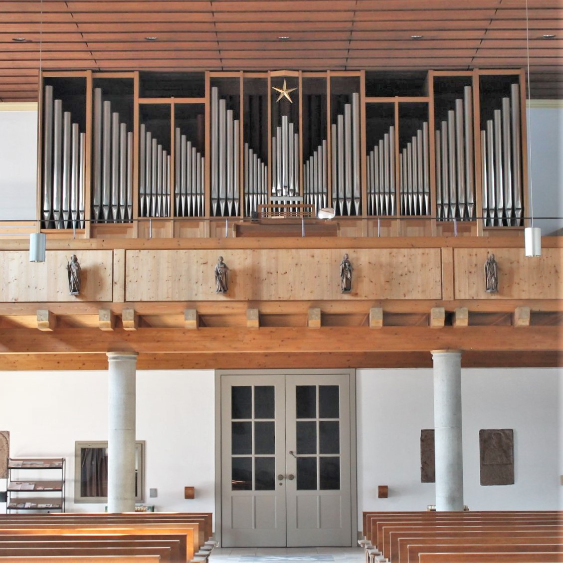 Orgel von St. Peter und Paul in München-Trudering (1980 von Wilhelm Stöberl, III/33)